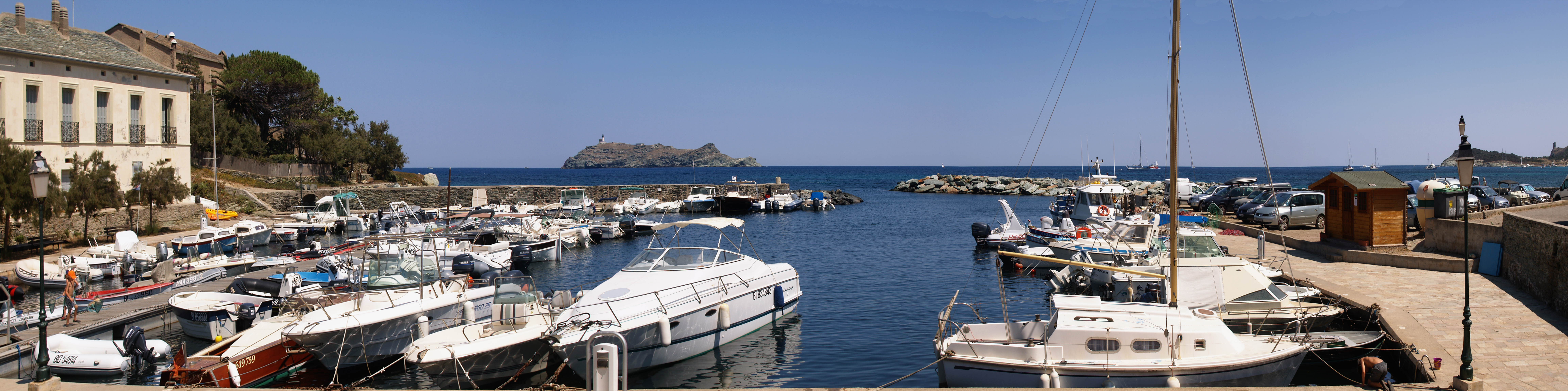 Ersa (Corsica) - L'île de la Giraglia vue depuis le port de Barcaggio